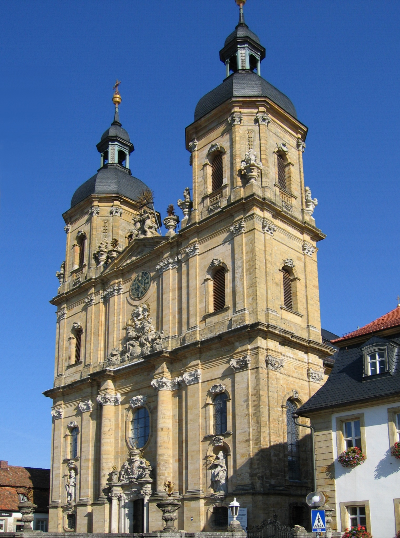 Barocke Dreifaltigkeitsbasilika in Gößweinstein (Fränkische Schweiz), erbaut 1730 bis 1739 nach Plänen von Balthasar Neumann, Wallfahrtsbasilika